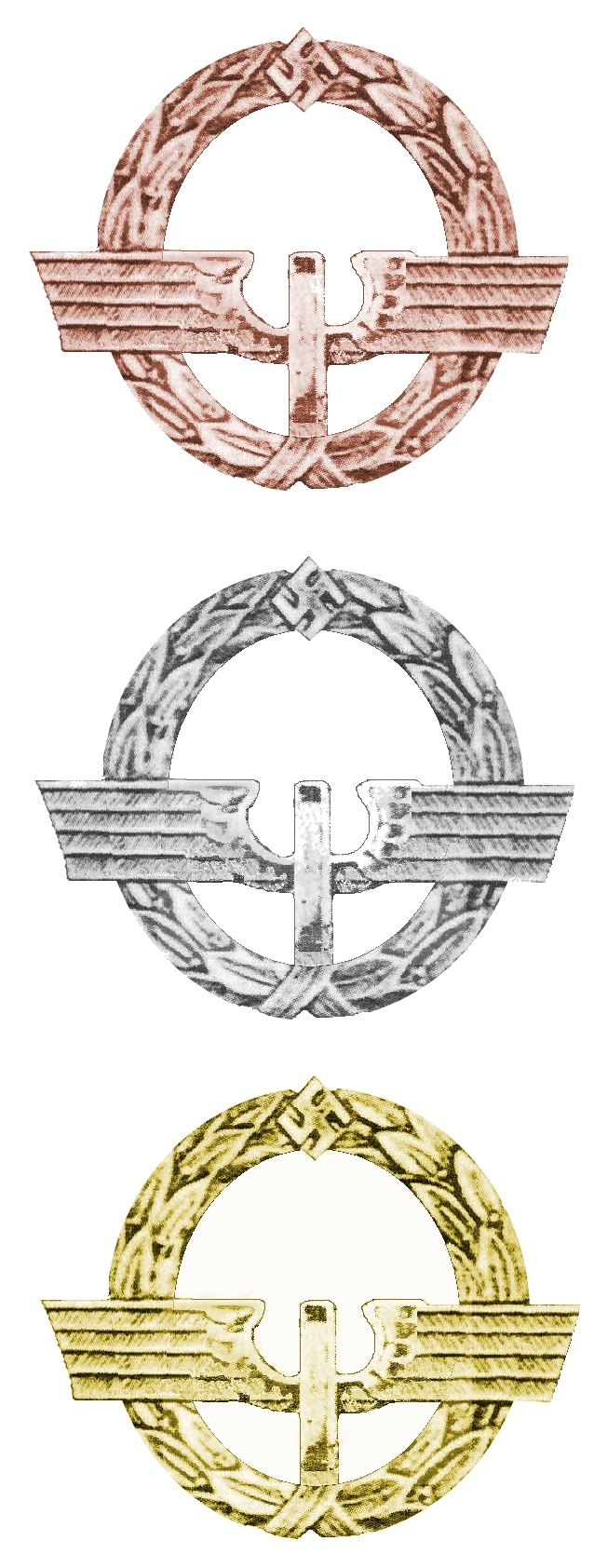 Grafische Darstellung der Dienstnadel für deutsche Eisenbahnerinnen